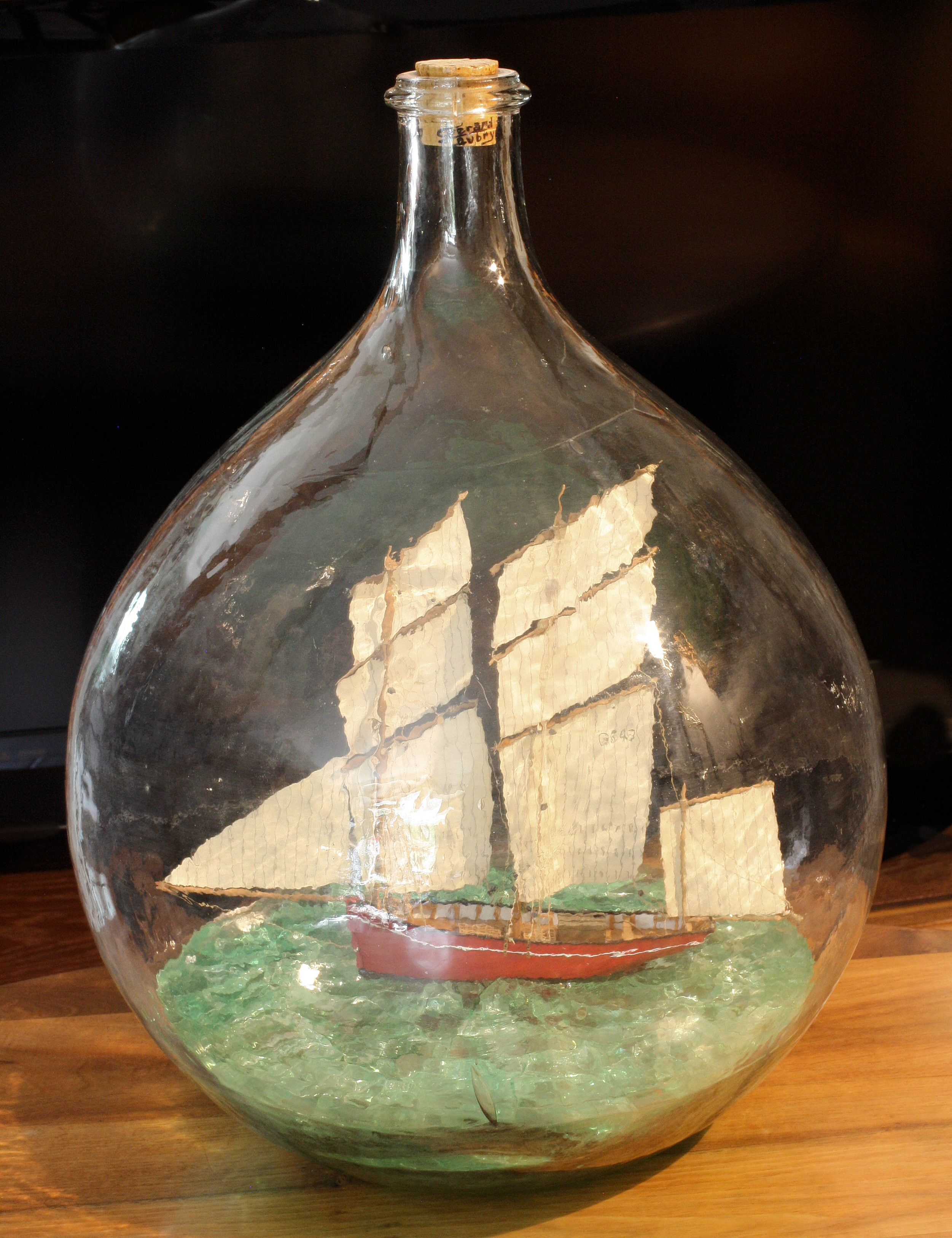 Bisquine de Granville dans une dame-jeanne de 30 litres.